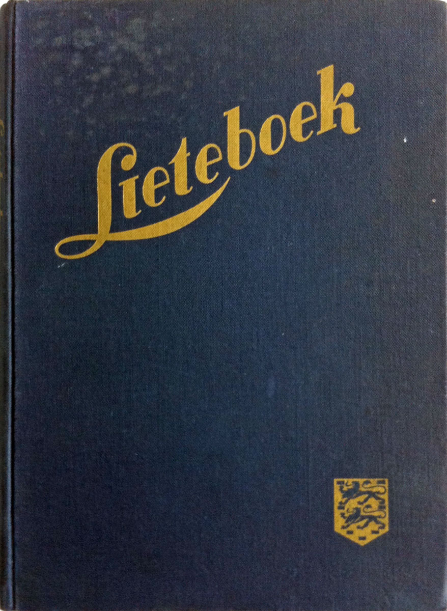 Omslach fan it Lieteboek út 1948